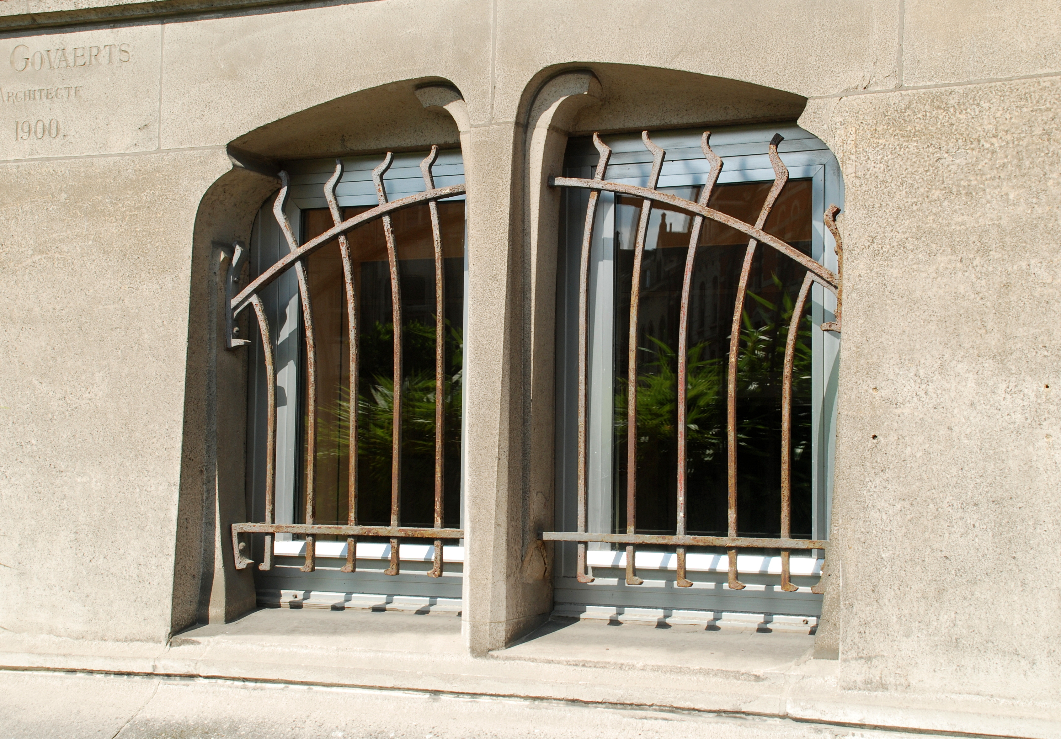 Belgique - Bruxelles - Hôtel Defize